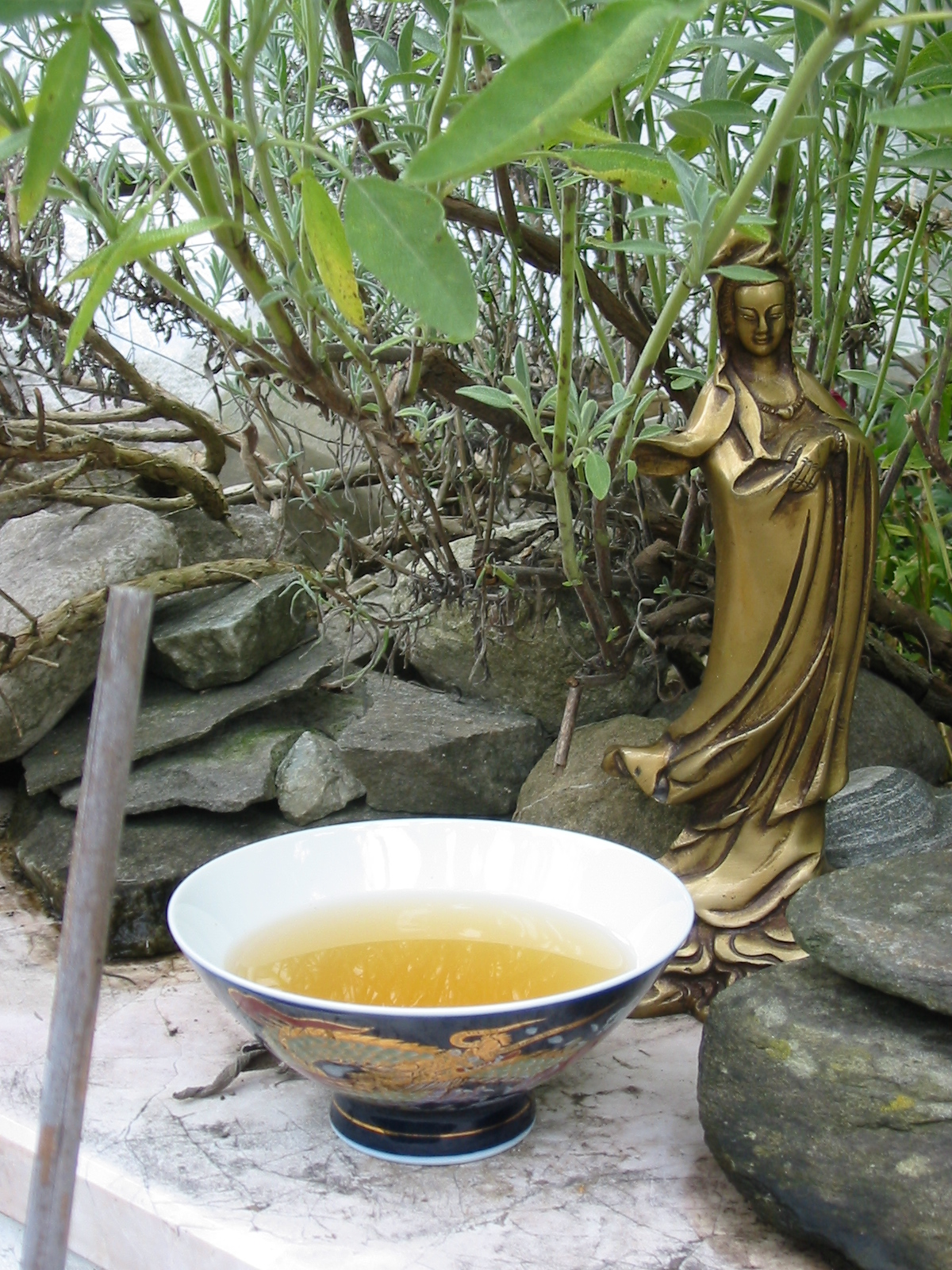 Kuan Yin looking at Tin Kuan Yin in an oolong bowl